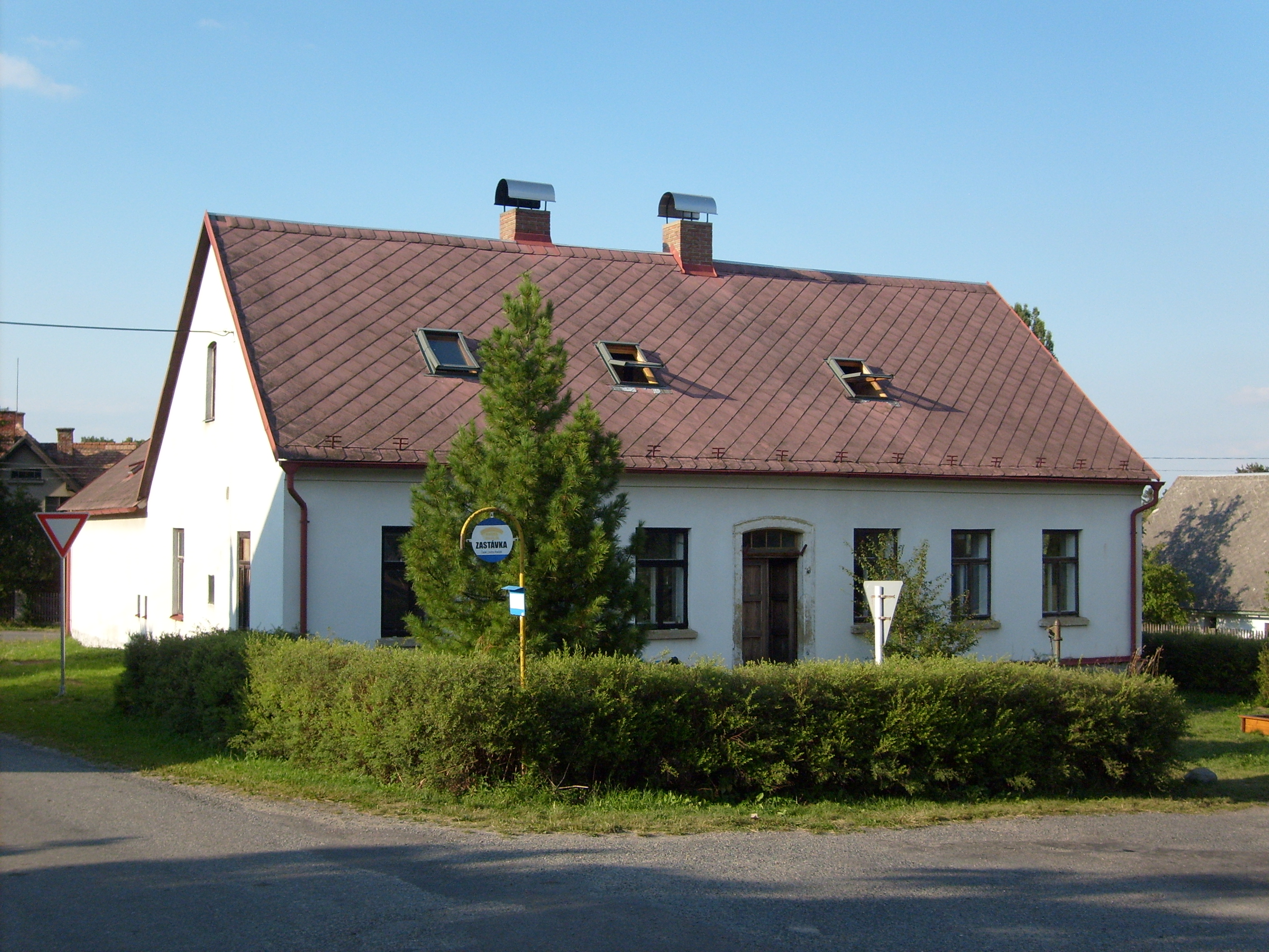 Bývalá evangelická škola v Hradišti (České Lhotice), Pardubice Region, Czech Republic